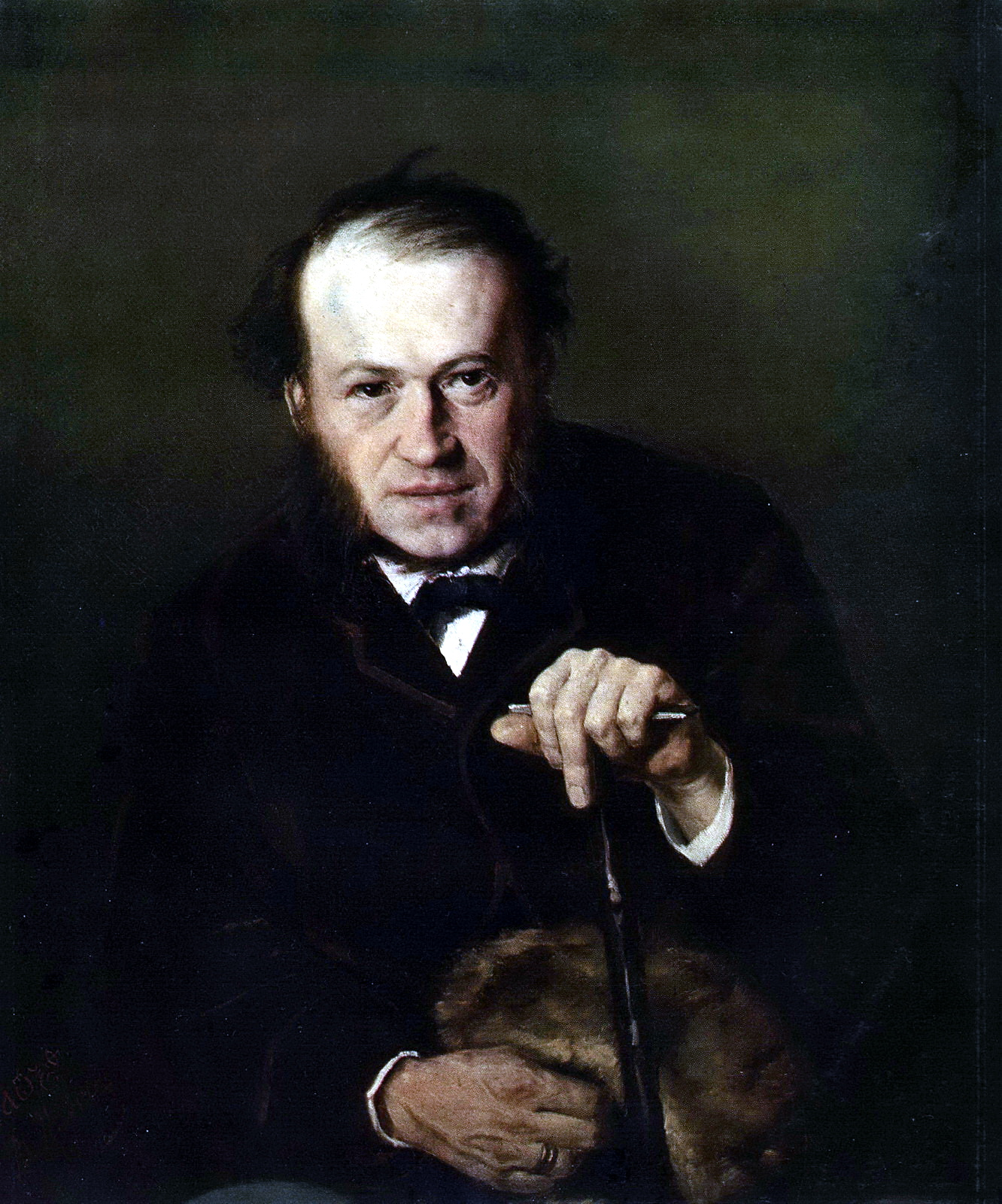 Портрет В.В. Безсонова